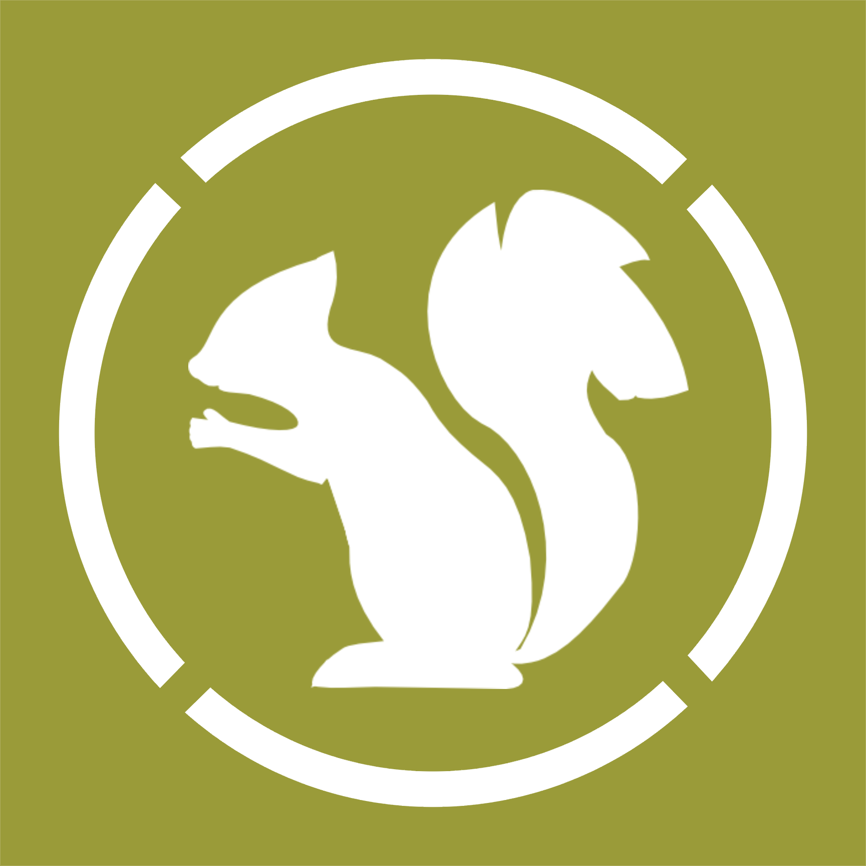 Znak na pojazdach 36 Pomorskiego Pułku Artylerii